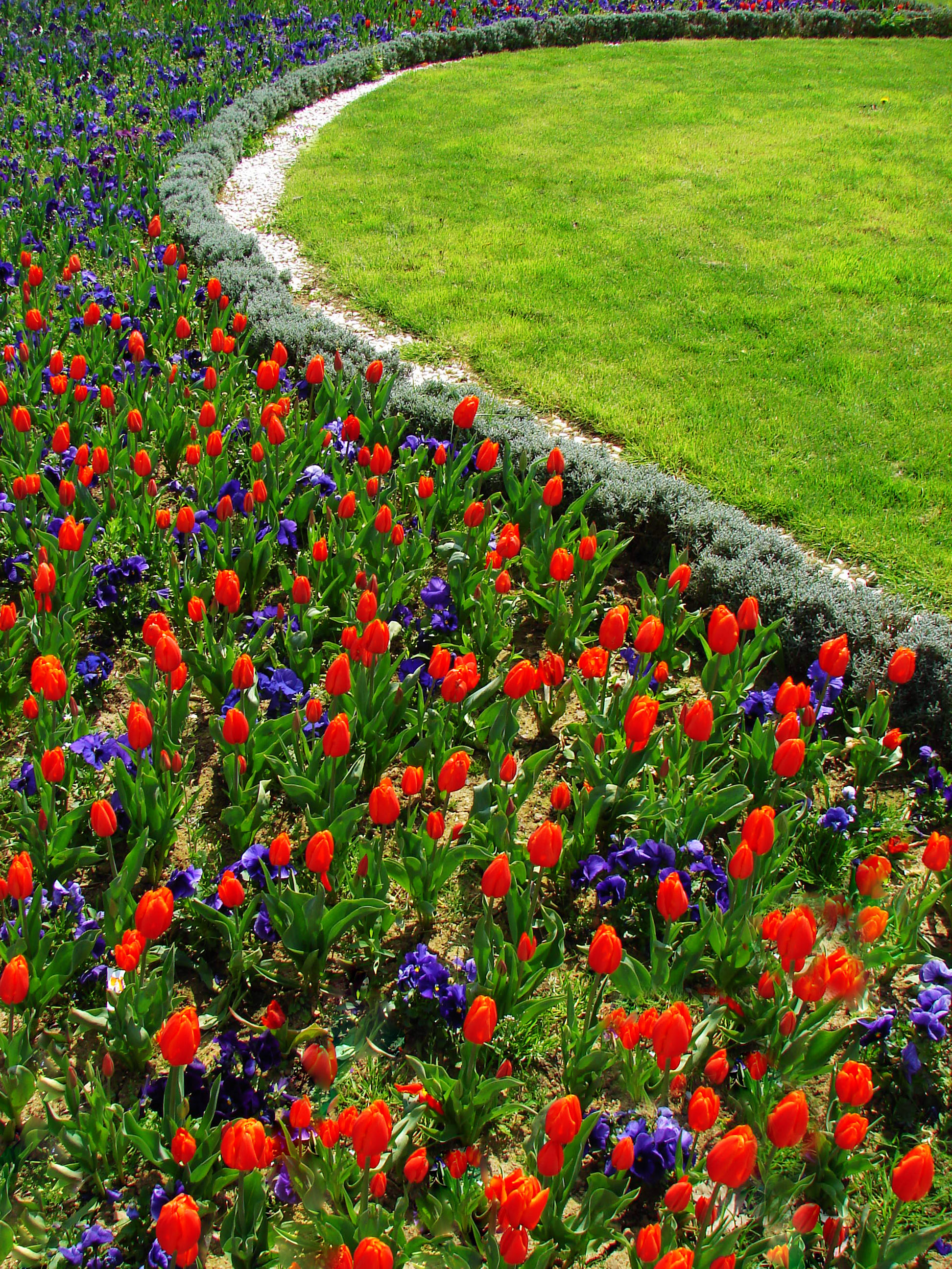 Tulips